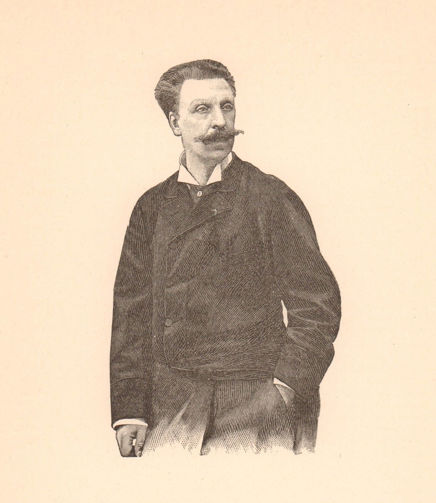 French composer Victorin de Joncières (1839-1903)